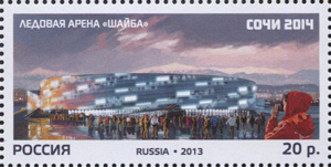 XXII Олимпийские зимние игры 2014 года в г. Сочи. Олимпийские спортивные объекты